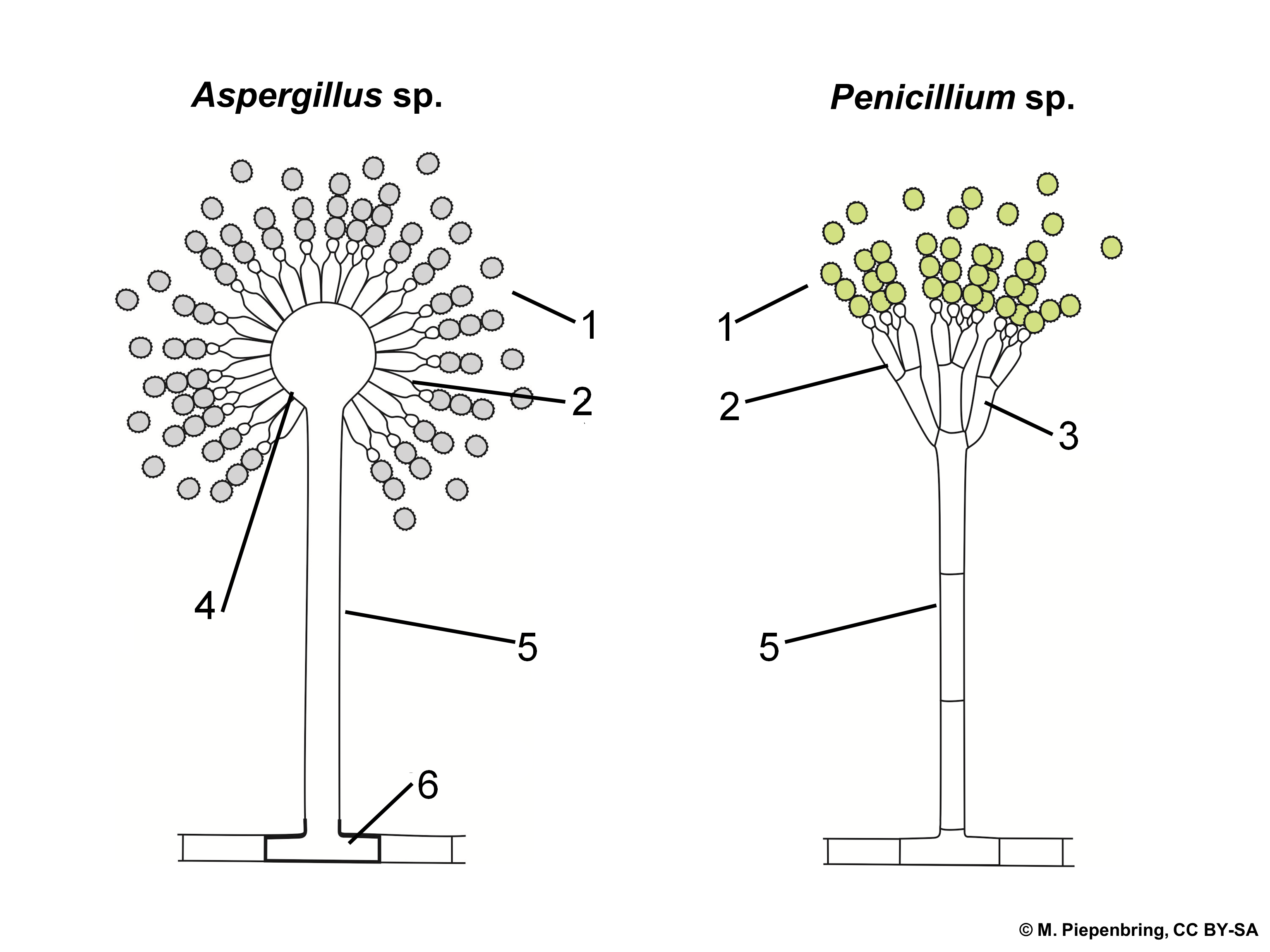 Conidiophores, Aspergillus, Penicillium, Eurotiales, Ascomycota